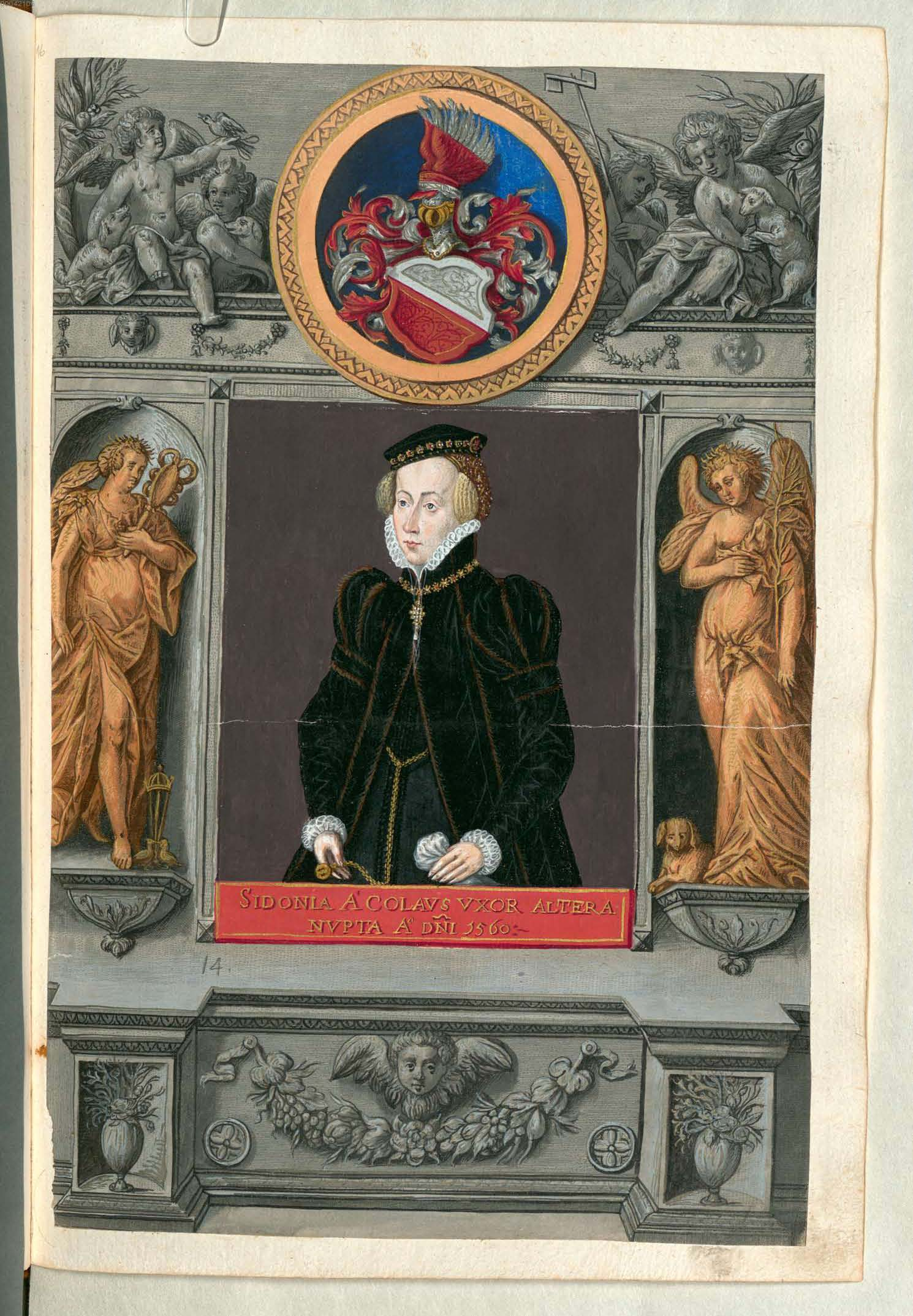 Fuggerorum et Fuggerarum imagines wurde 1588 von Philipp Eduard Fugger beim Kupferstecher Dominicus Custos in Auftrag gegeben. Das Werk enthält mit Aquarell- und Gouache-Farbe kolorierte Stiche der Mitglieder der Fugger von der Lilie. Der Druck von 1618 stellt das einzige kolorierte Exemplar dar. Sidonia de Colaus, genannt Watzler (?-1573), zweite Ehefrau Johann Jakob Fuggers (1516-1575)